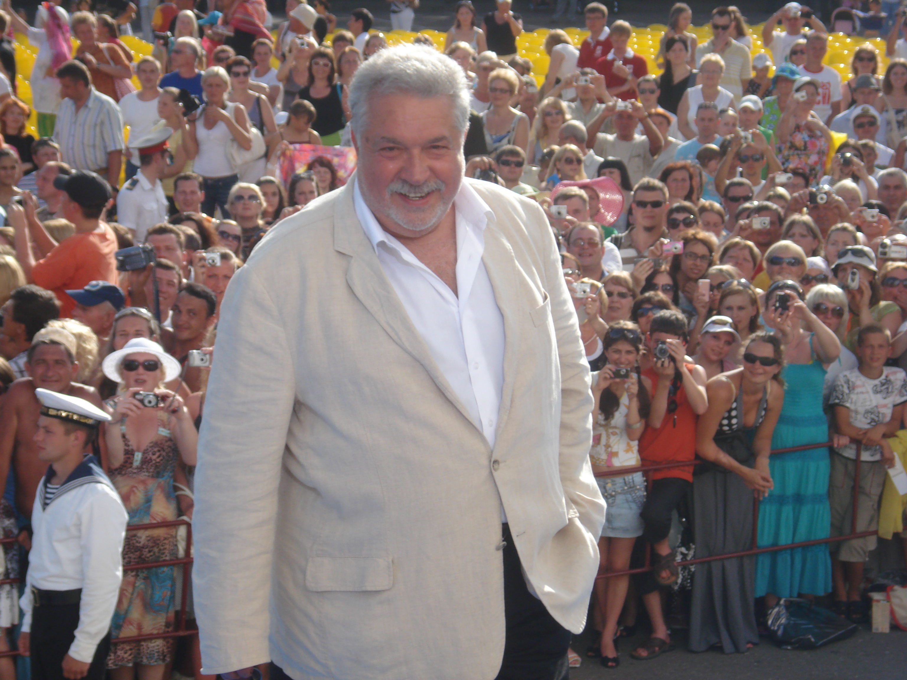 Юлий Соломонович Гусман, 21 Кинотавр 2010